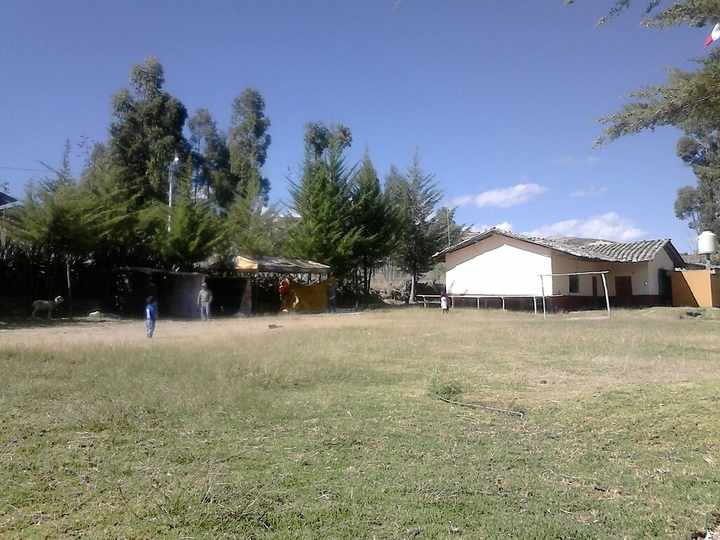 El caserío de Vallicopampa se encuentra ubicado al norte del territorio peruano,en la cadena occidental de los Andes y abarca zonas se sierra y selva.